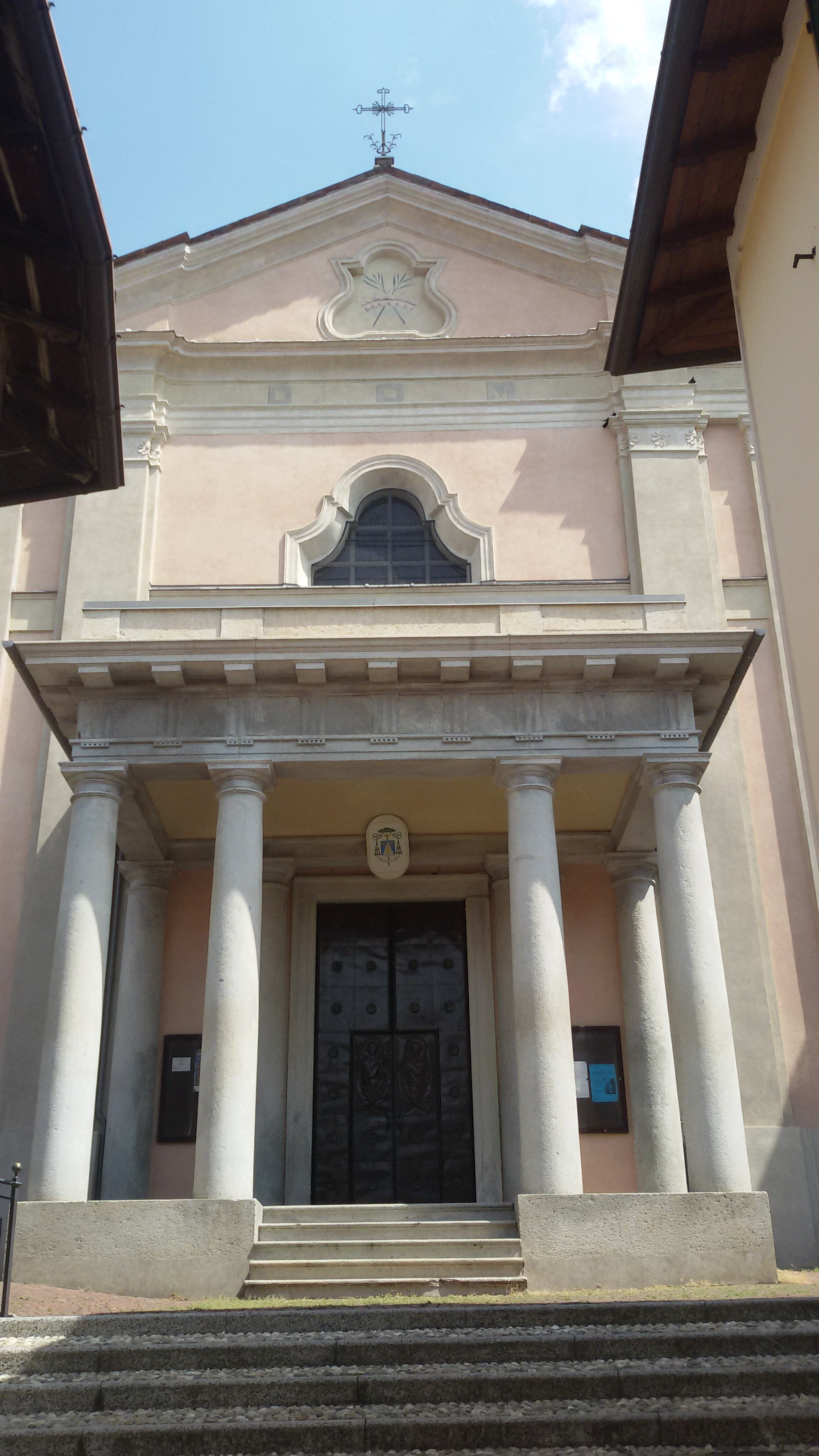 Facciata principale Chiesa parrocchiale Santi Gervasio e Protasio Vercurago